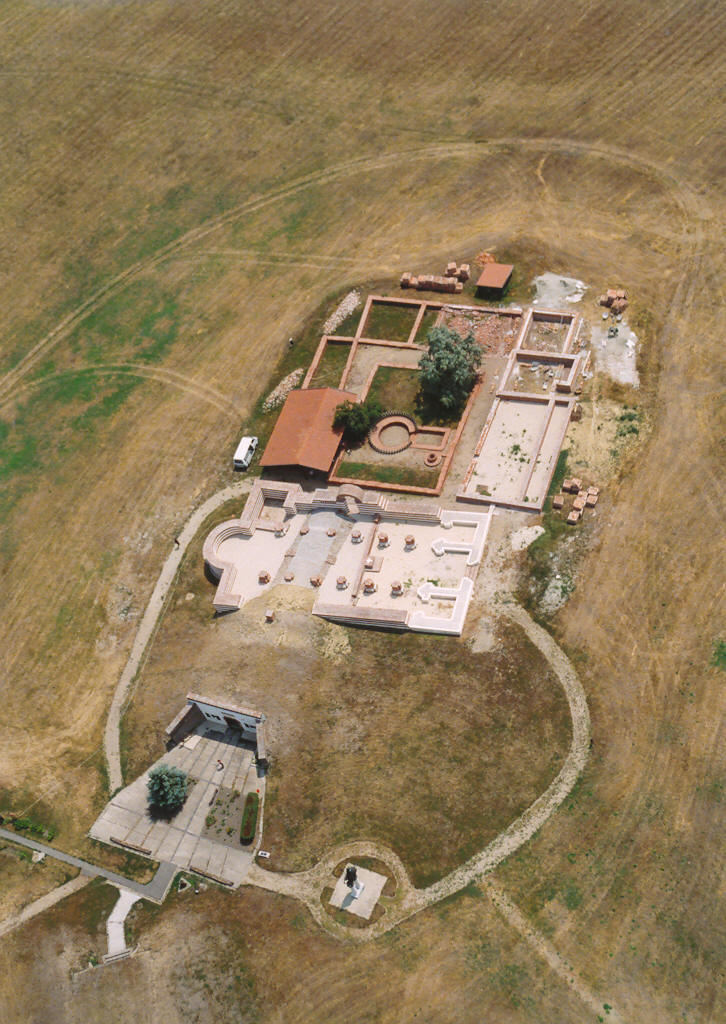 Történelmi Emlékhely - Vésztő-Mágor - Békés megye - Hungary - Europe